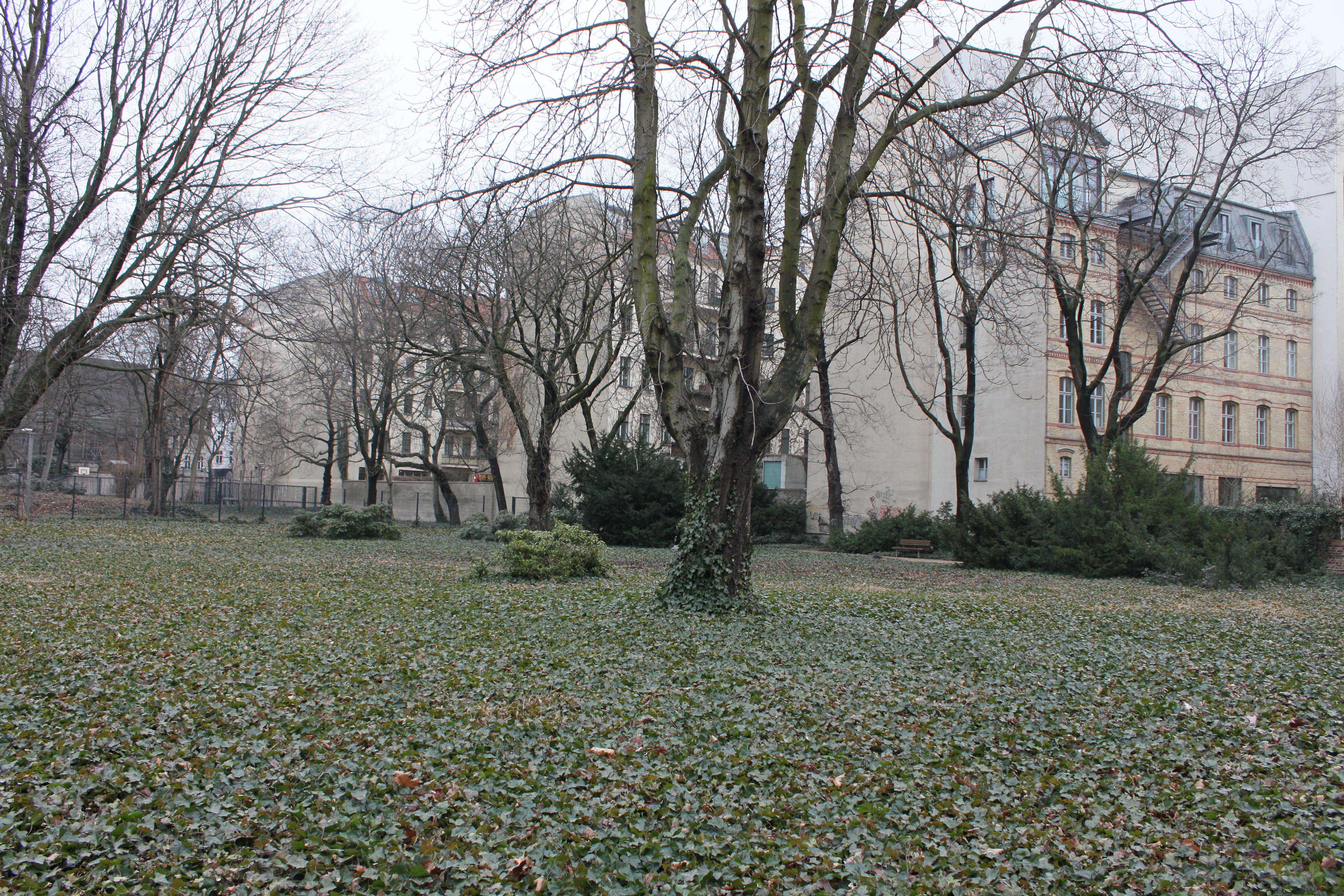 Jüdischer Friedhof Berlin-Mitte